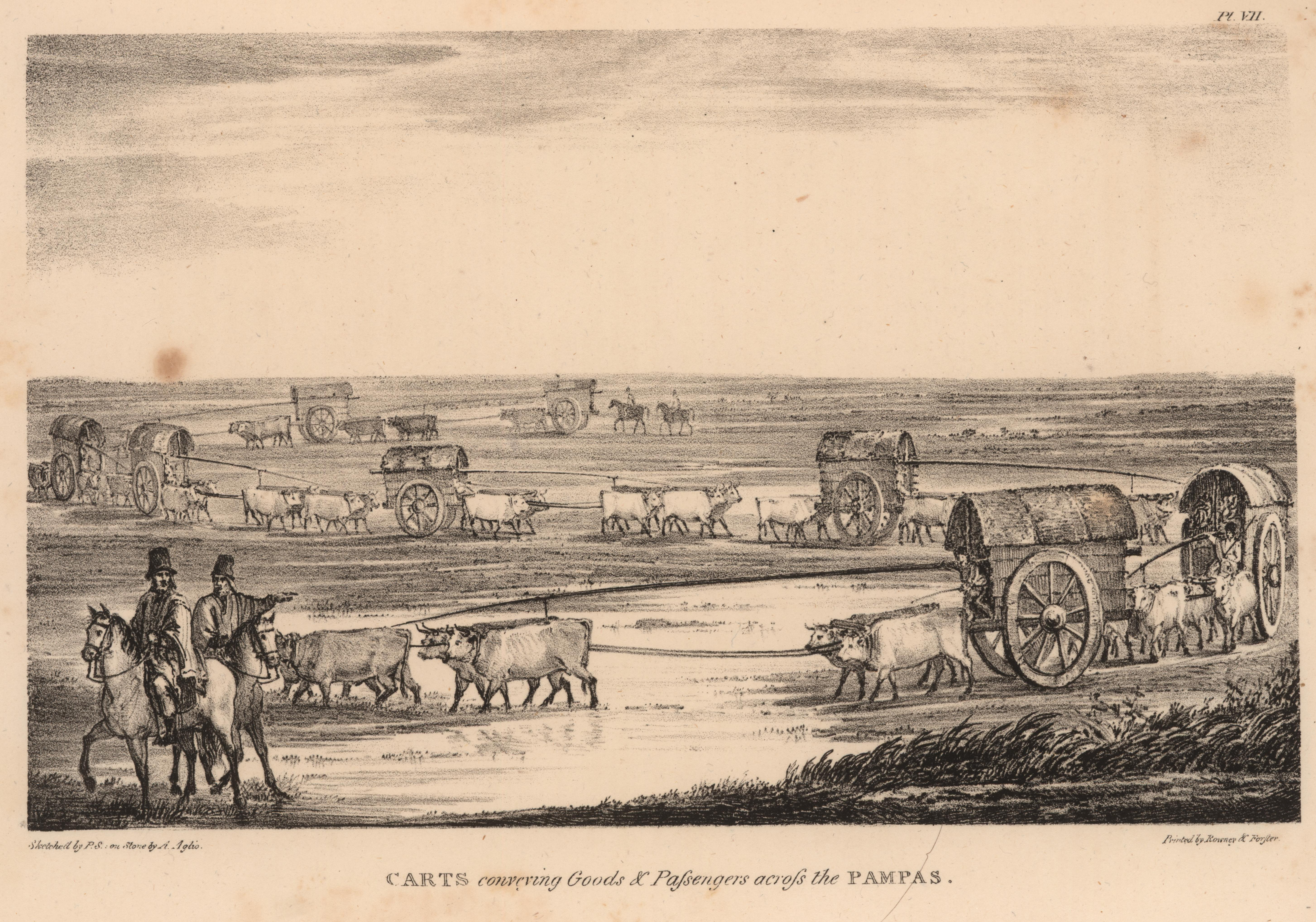 Caravana de carretas tiradas por bueyes a través de las pampas con productos y pasajeros. Dibujo del viajero y filántropo inglés Peter Schmidtmeyer; litografía de Agostino Aglio; impresa por Rowney & Forster y publicada en el de libro de Schmidtmeyer Travels into Chile, over the Andes, in the years 1820 and 1821, London: Longman, Hurst, Rees, Orme, Brown and Green, 1824.